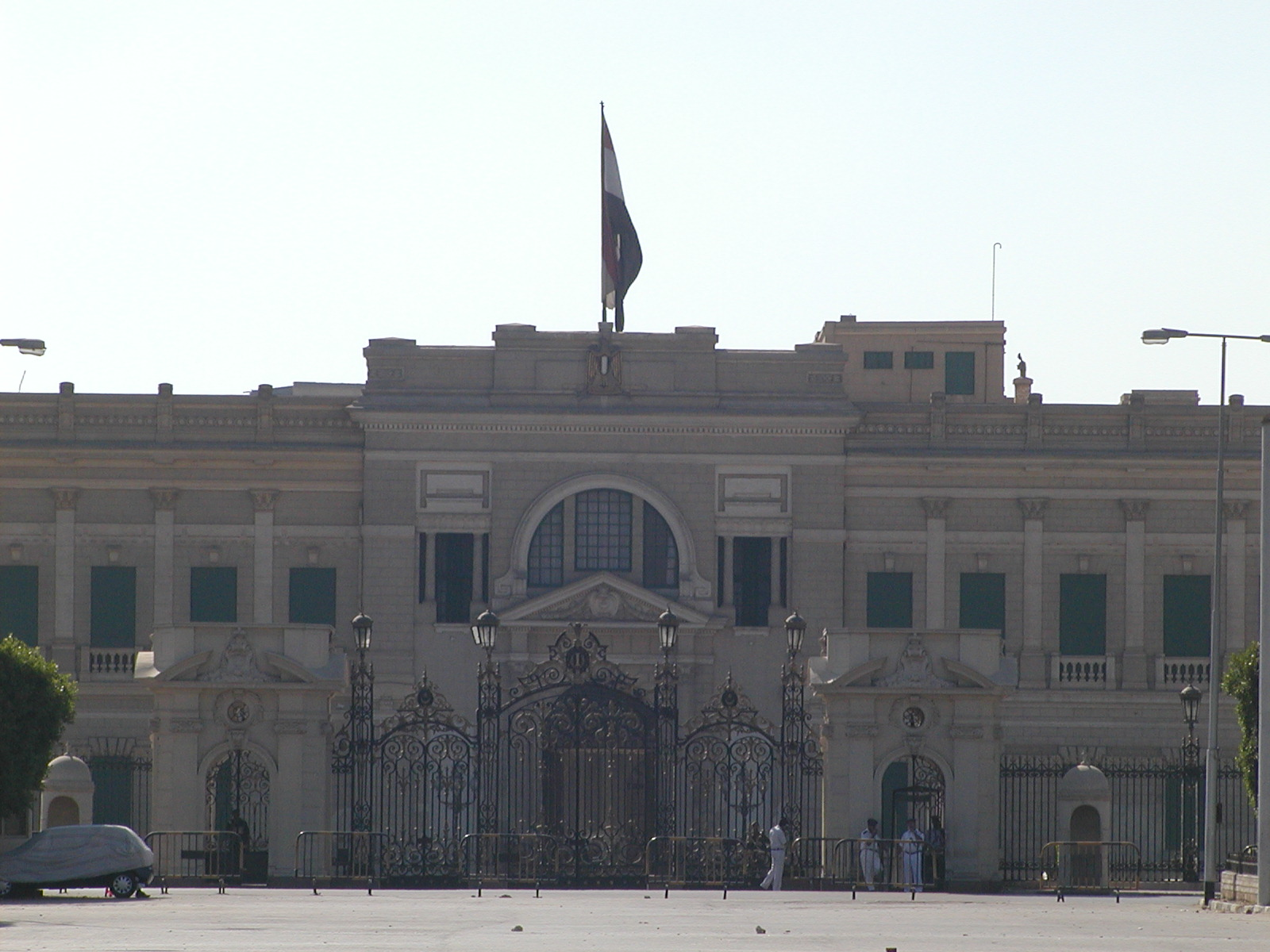 Entrée du Palais d'Abedin, Le Caire, Égypte.